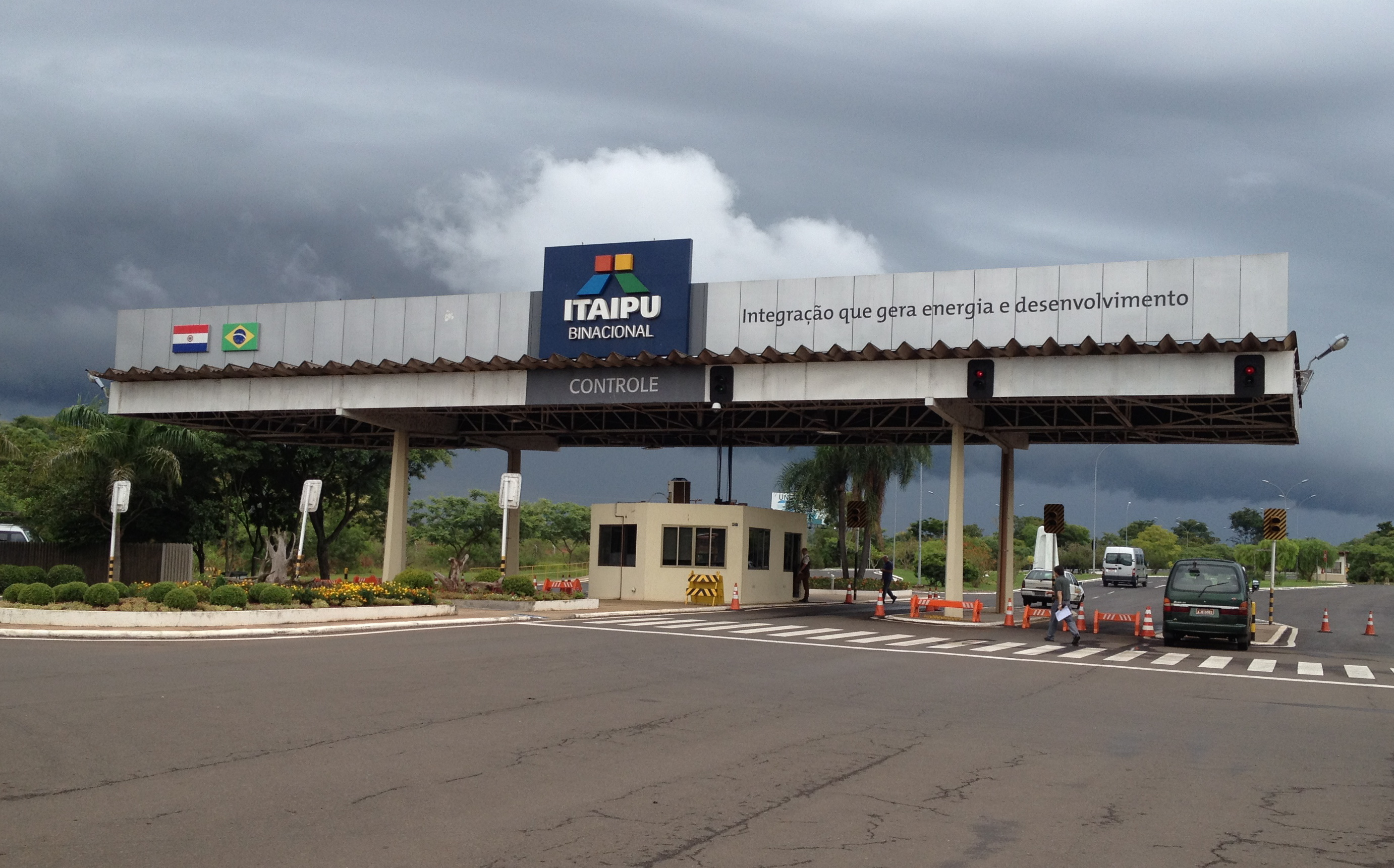 Itaipú Eingang zum Gelände